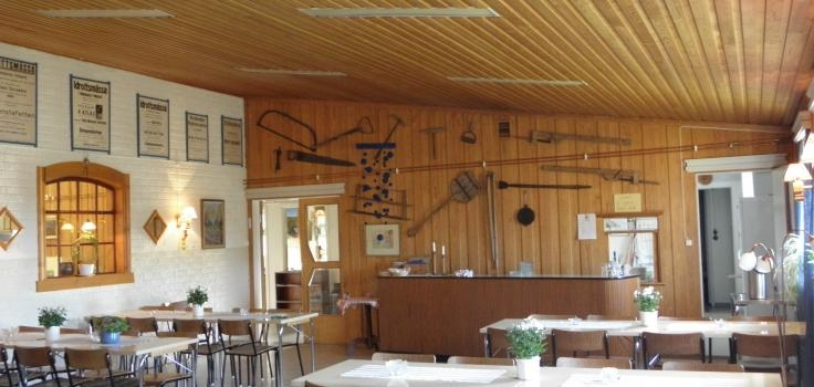 Café i Mölnbacka Bygdegård